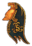 insigne mle 1965